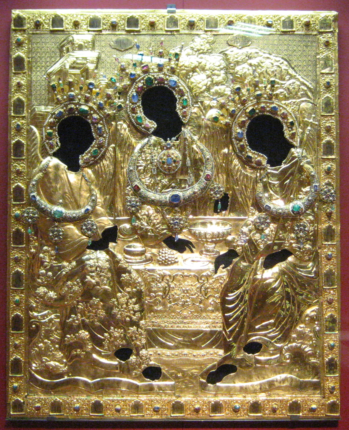 ОКЛАД ИКОНЫ «СВЯТАЯ ТРОИЦА» АНДРЕЯ РУБЛЕВА Конец XVI века; 1754 год. Камея на сапфирине – XI век Москва. Камея на сапфирине – Византия Камея на изумруде, предположительно, является работой венецианского мастера Франциско (Франческо) Асцентини, работавшего в Москве на рубеже XVI–XVII веков. Цаты вычеканены в 1626 году Яковом (Якубом) Гастом и Иваном (Яном) Лентом (Мастерские Московского Кремля) по образцу изделий середины XVI века. Риза изготовлена мастером мануфактуры В.М. Кучкина Иваном Григорьевым в 1754 году Золото, серебро, бриллианты, изумруды, рубины, сапфиры, рубеллиты, шпинели, гессанит, сапфирин, кварц, стекло, хризопраз, жемчуг; чеканка, гравировка, чернь, скань, финифть, золочение, низание жемчугом, резьба по драгоценным камням, огранка, шлифовка 40 х 115 Происходит из Троицкого собора Троице-Сергиевой лавры. В монастырь оклад поступал по частям: рама, сень, венцы – вклад царя Бориса Годунова в 1599–1600 годы; панагия – вклад царевича Федора Борисовича Годунова в начале XVII века; цаты приложены к образу царем Михаилом Федоровичем Романовым в 1626 году; риза изготовлена по заказу и на средства монастыря в 1754 году. От иконы оклад отделен в 1918 году Реставрирован в 1946 году Ф.Я. Мишуковым и А.В. Флеровым; в 2009 году в СПМЗ П.Н. Котельниковым и В.А. Понсовым СПМЗ инв. инв. 394-ихо